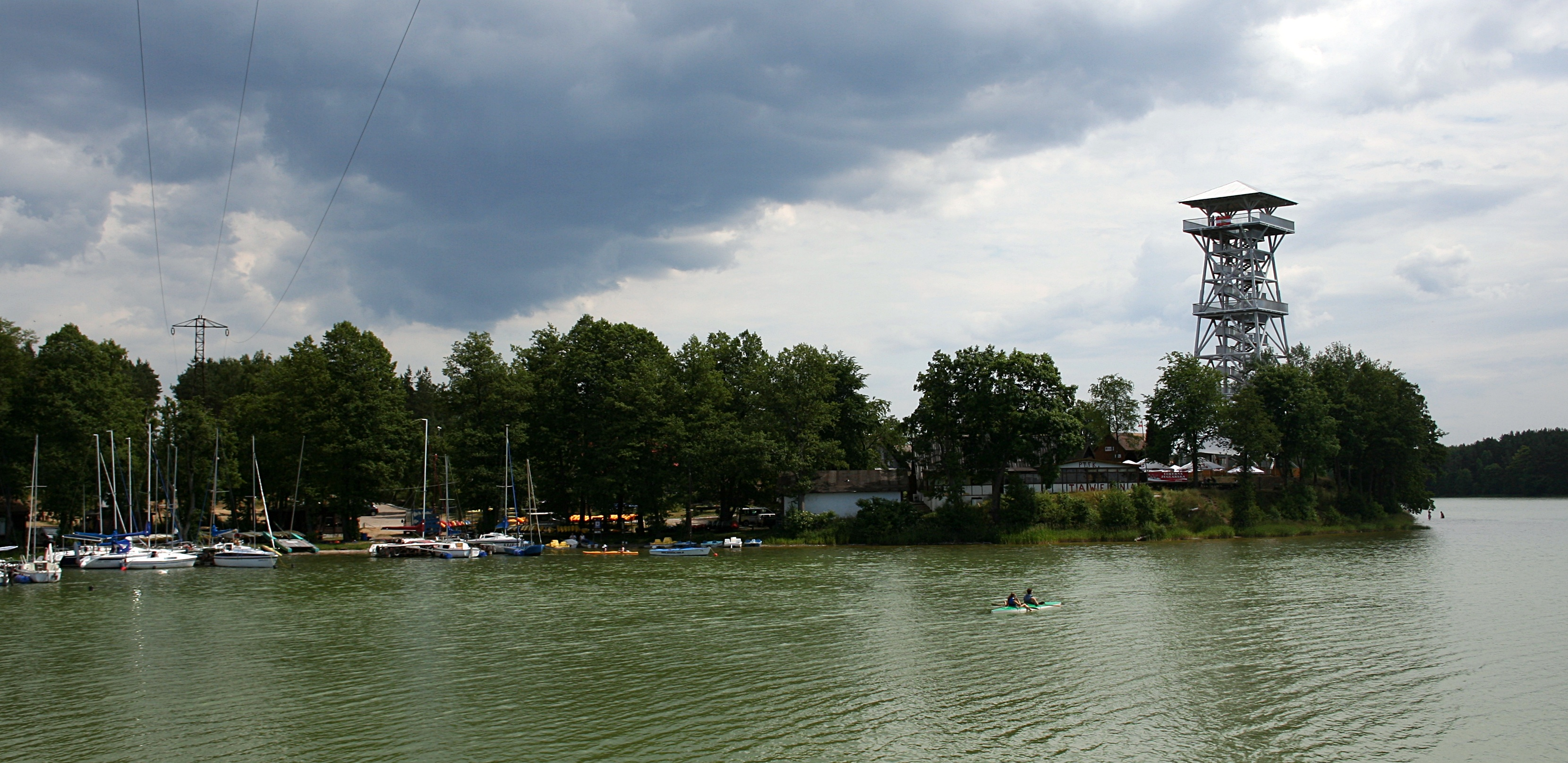 Wdzydzki Park Krajobrazowy, punkt widokowy w miejscu skrzyżowania wód Jeziora Gołuń i Jeziora Jelenie